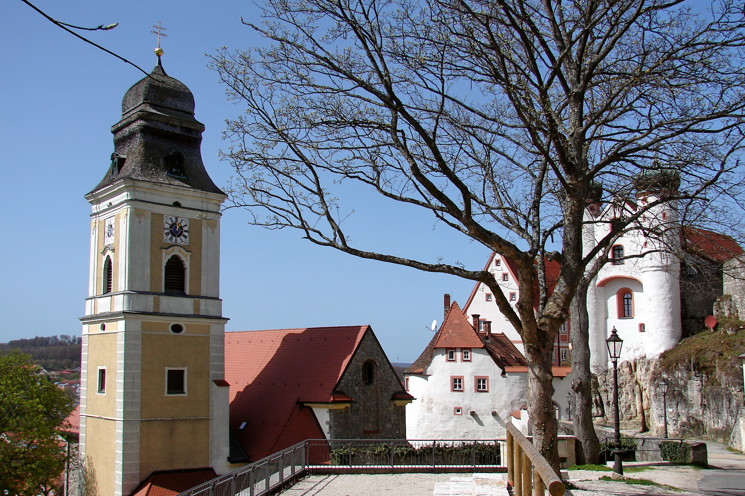 Parsberg ist die viertgrößte Stadt im Oberpfälzer Landkreis Neumarkt in der Oberpfalz.